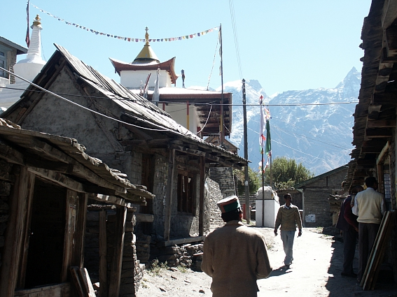 Street in Kalpa, Kinnaur, Himachal Pradesh, India